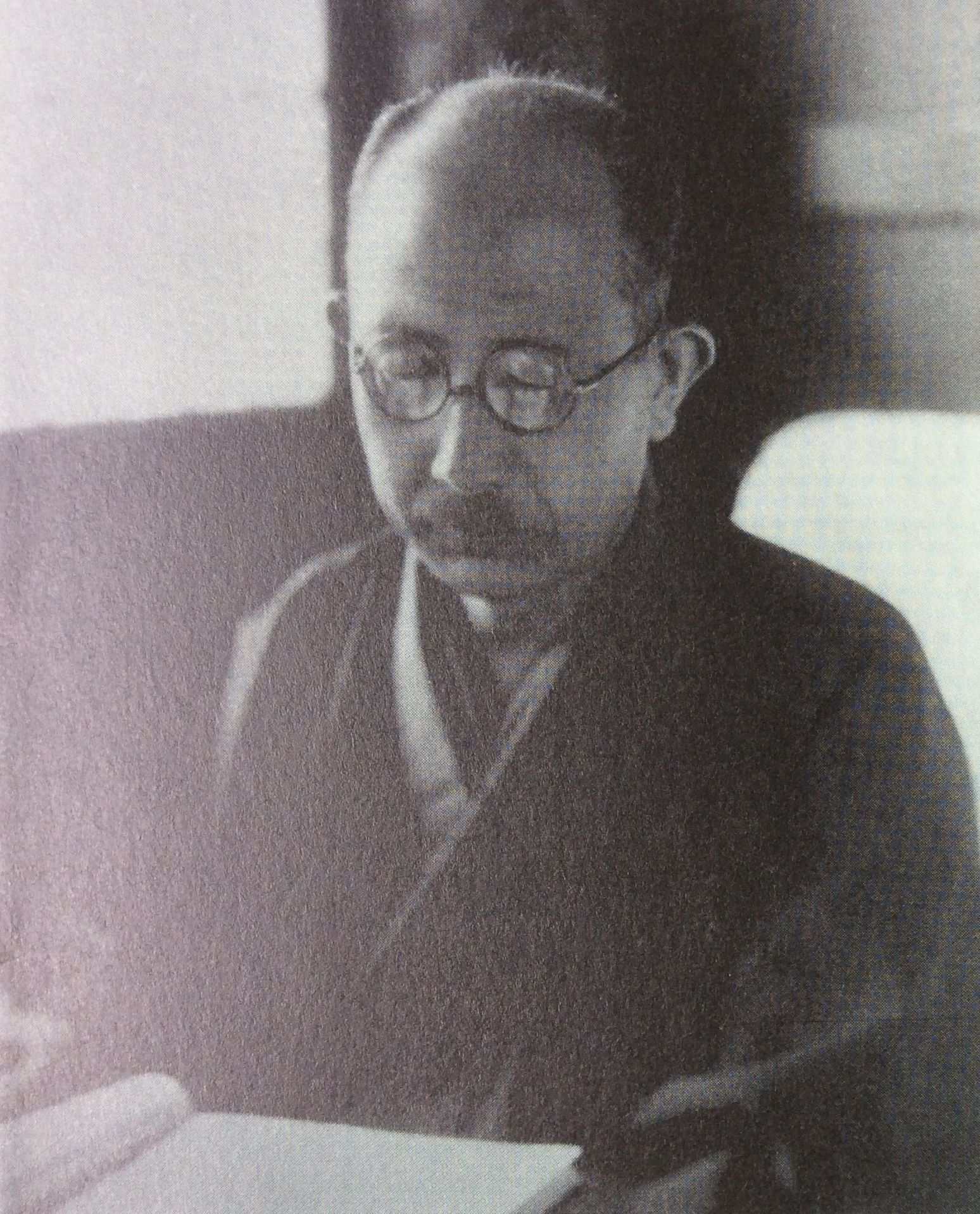 （2015年5月18日撮影）